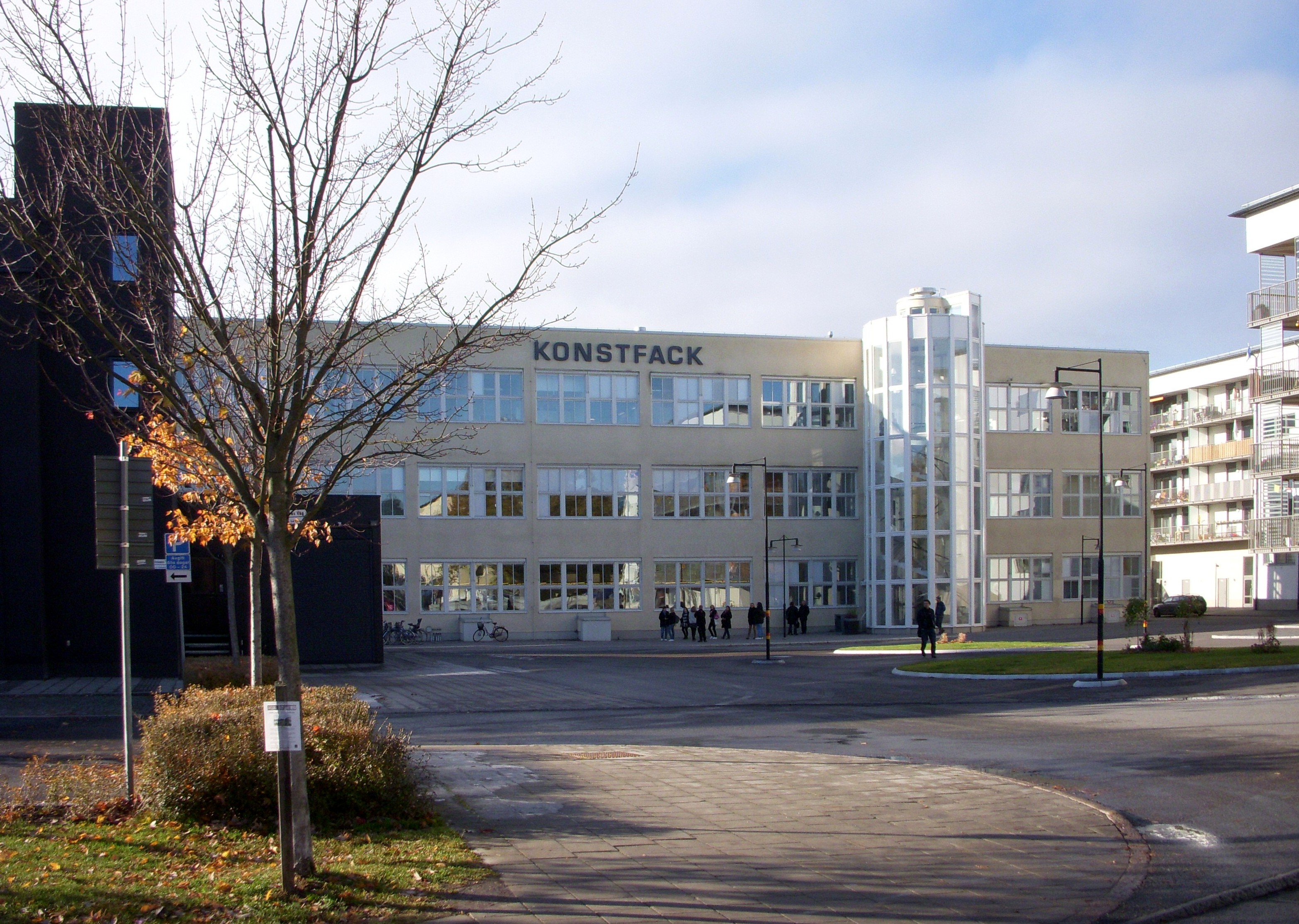 LM Ericsons byggnad i Västberga, idag Konstfack